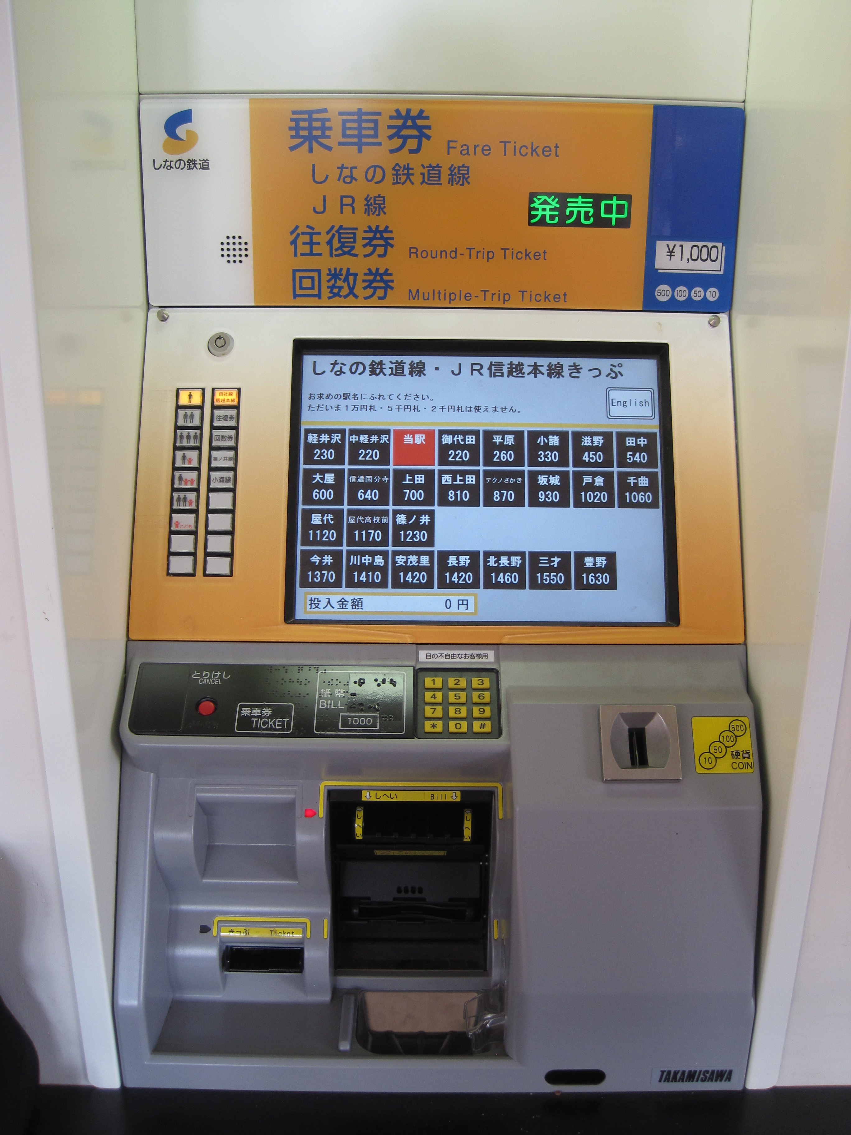 2013年7月13日より使用を開始した信濃追分駅の自動券売機